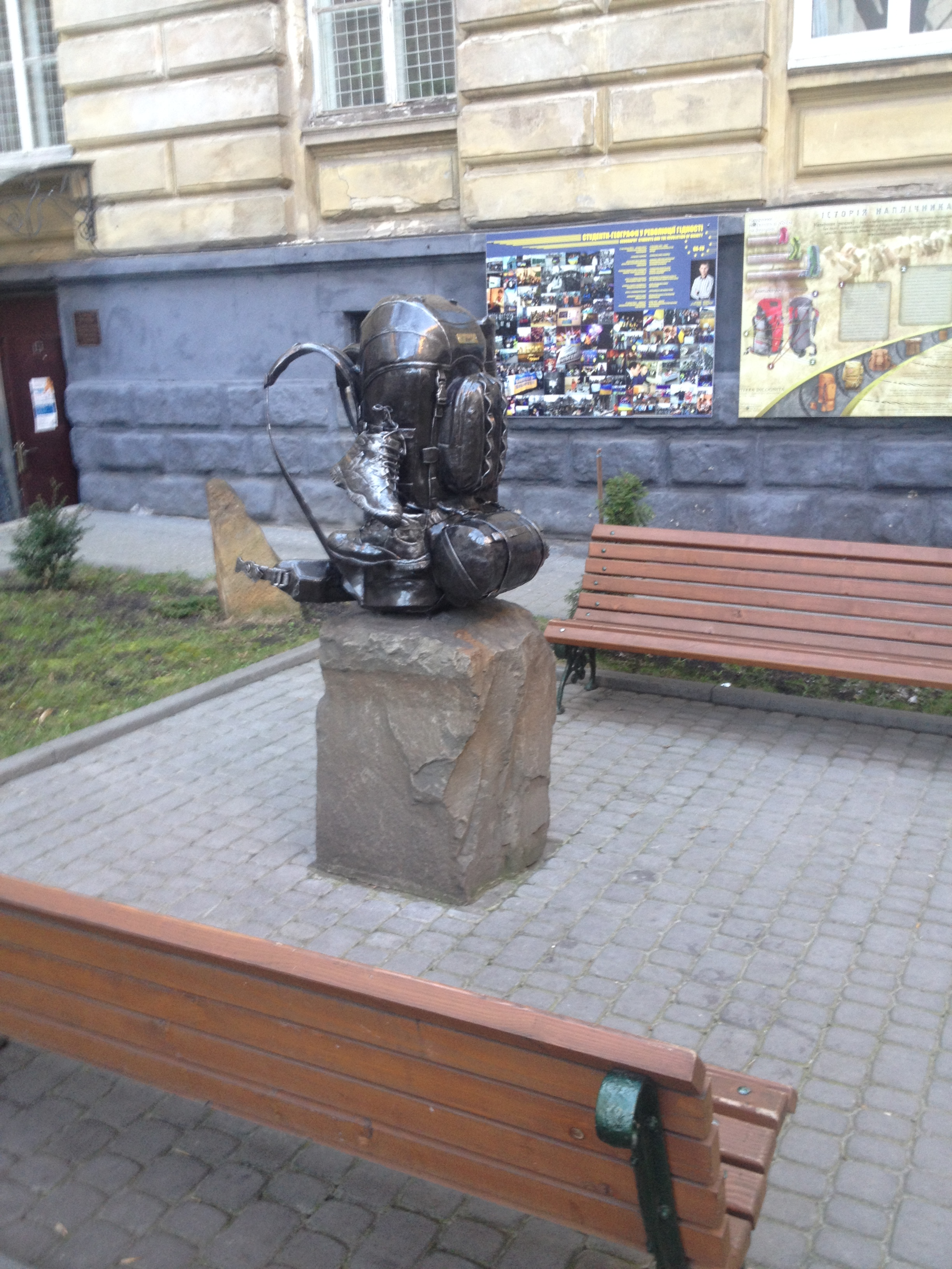 Памятник наплічнику